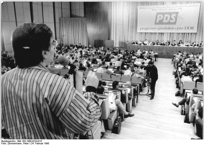 ADN-ZB Zimmermann-24.2.90-wü Berlin: 1. PDS-Parteitag- Als Wahlparteitag zu den in drei Wochen stattfindenden Volkskammerwahlen begann der zweitägige Kongreß. Beraten und abgestimmt wird über ein neues Programm und überarbeitetes Statut, über Wahlkampf, -programm und Spitzenkandidaten für den 18. März sowie über den neuen Parteinamen. (Siehe auch 5+6N)